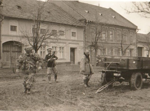 Fotografie z rodiného archivu (1963)